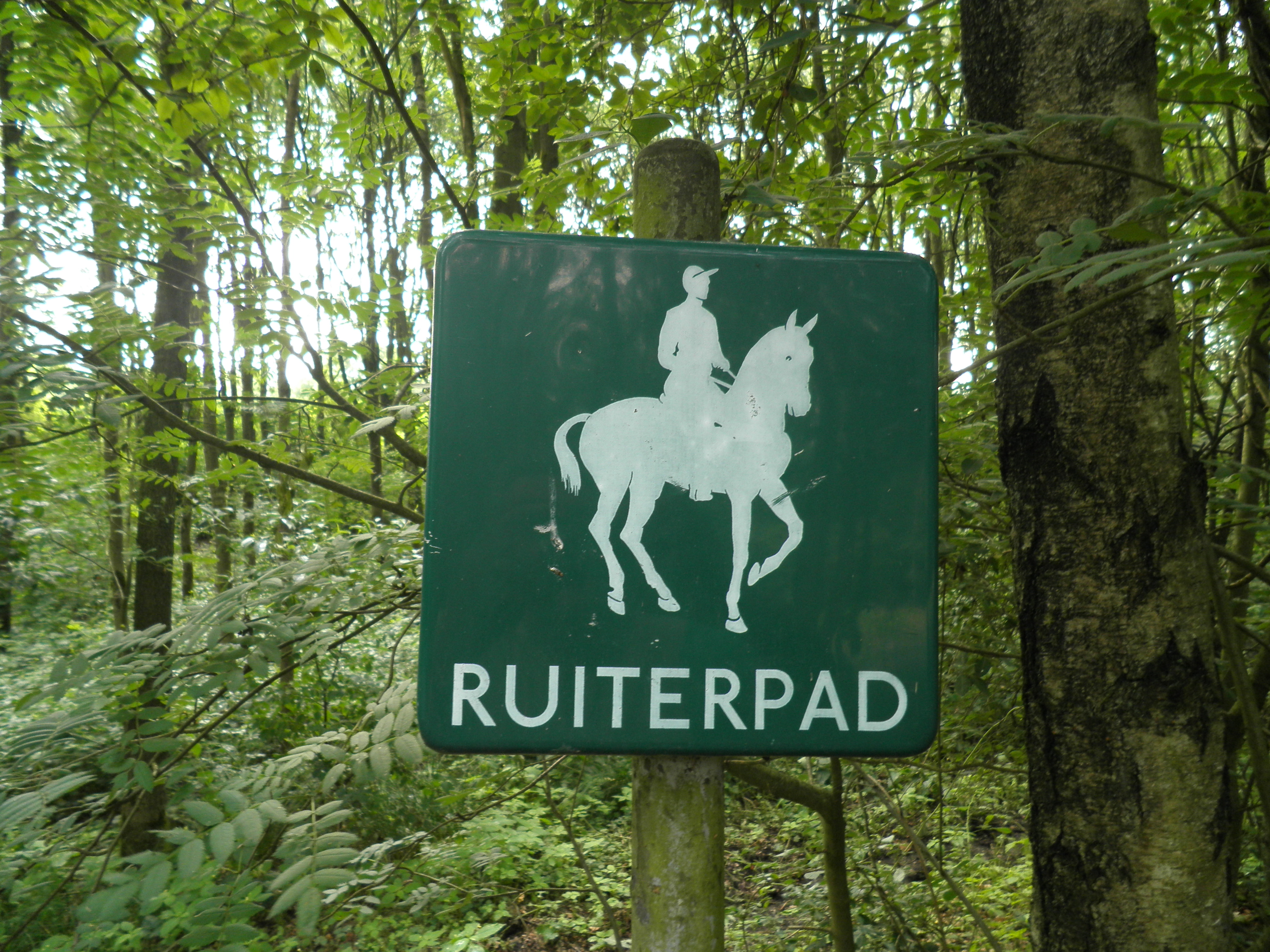 Panneau représentant un cavalier